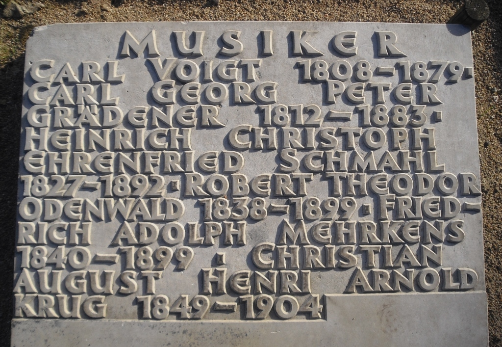 Erinnerung an den Pianisten, Komponisten und Musikpädagogen Arnold Krug (1849-1904) auf einer Sammelgrabmaltafel im Althamburgischen Gedächtnisfriedhof auf dem Friedhof Ohlsdorf in Hamburg